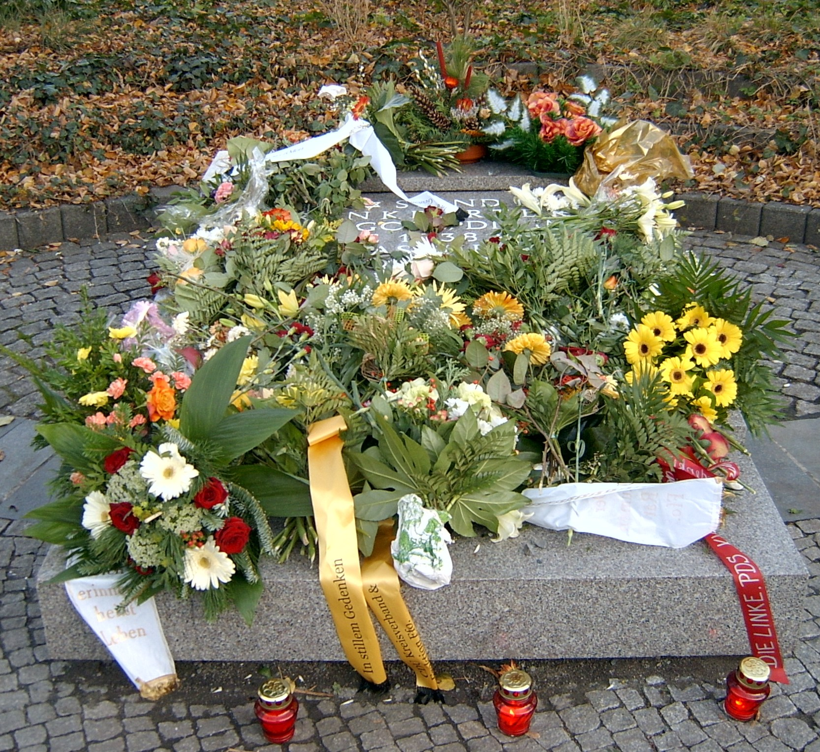 Gedenkstein für die jüdische Synagoge in Frankfurt (Oder). Aufnahme am Tag nach dem Jahrestag der Novemberpogrome 1938.